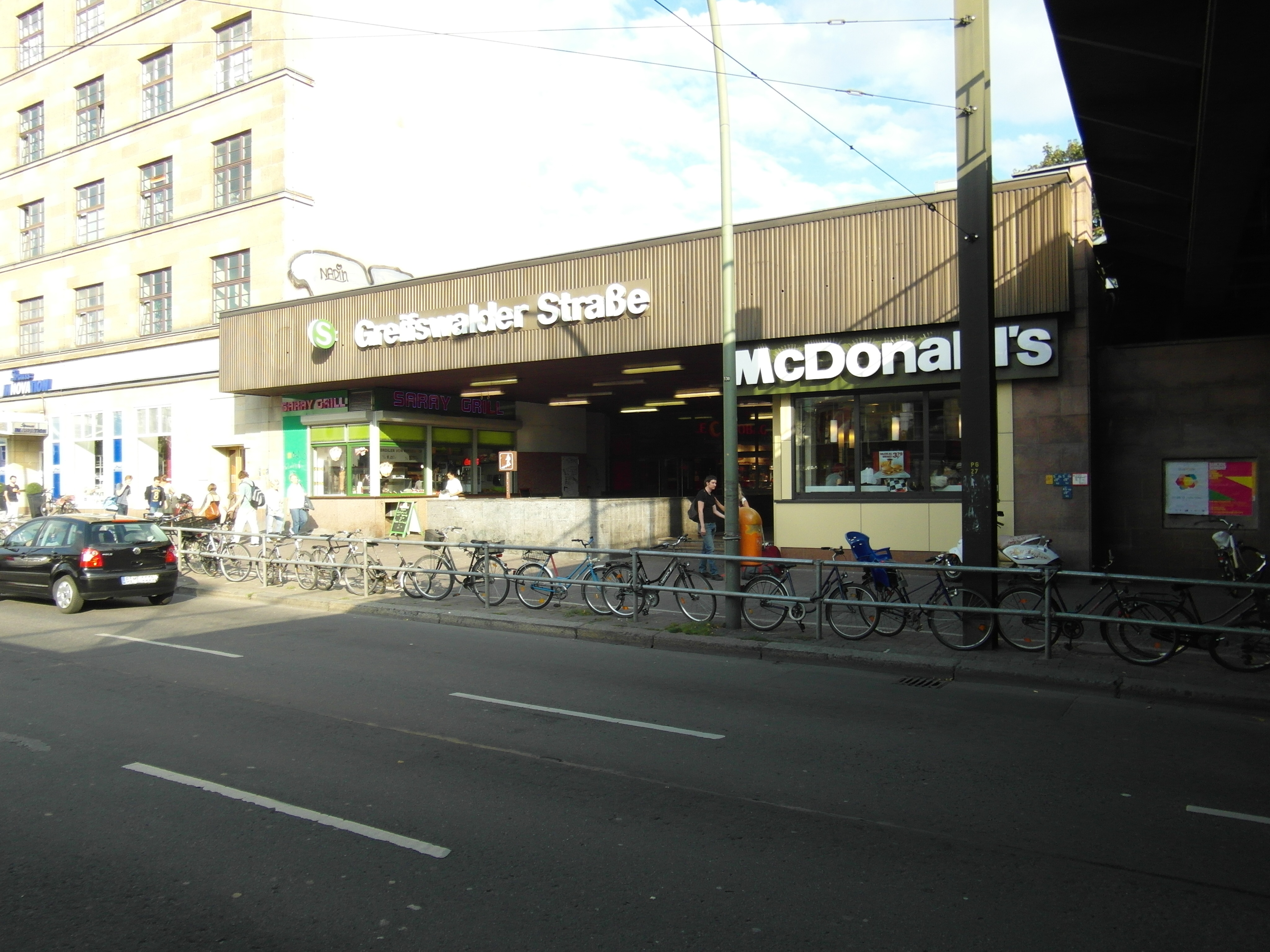 Ringbahn - Linien S41, S42, S8, S9 und vielleicht auch mal wieder S85